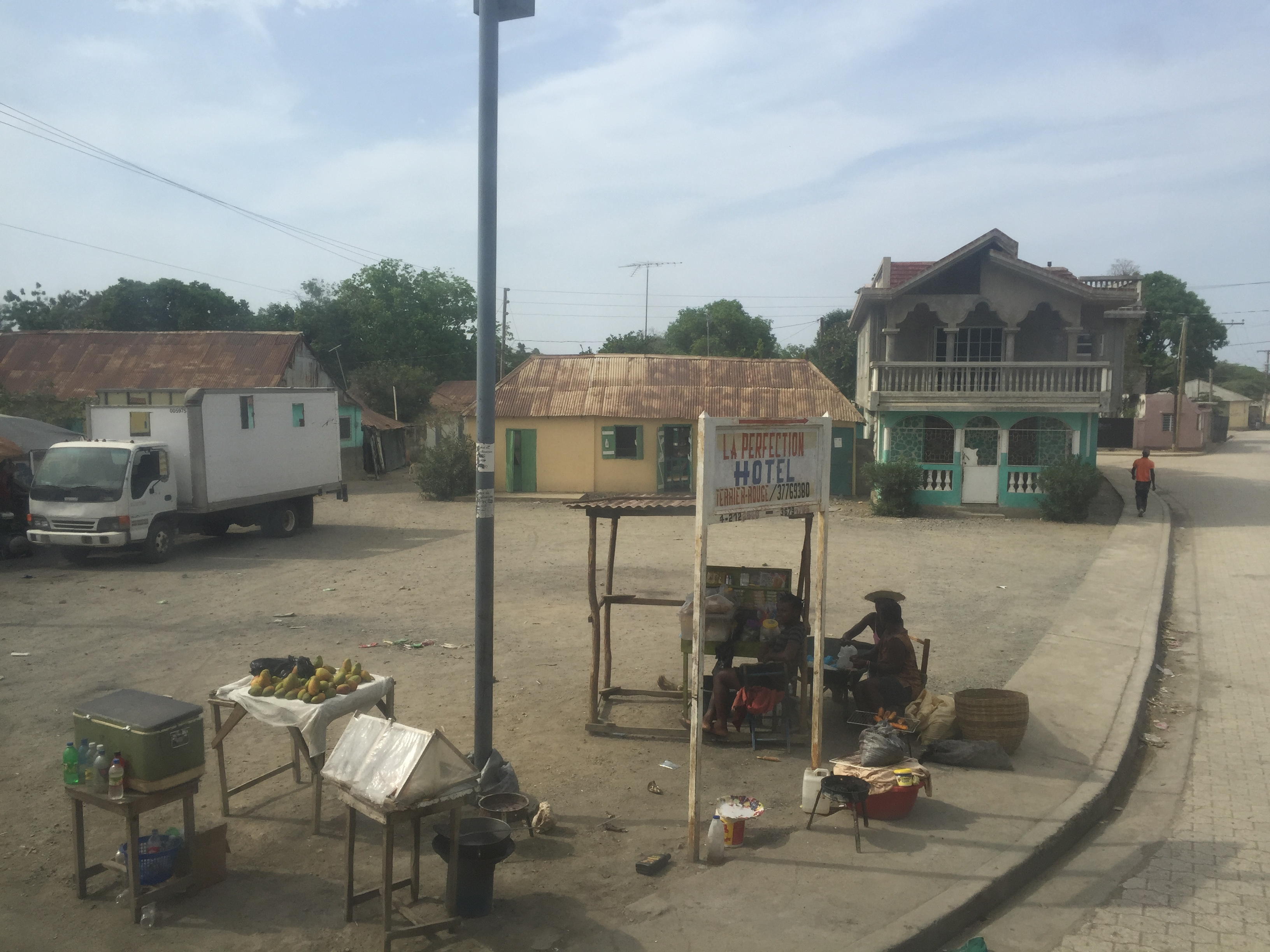 Terrier-Rouge, Haiti